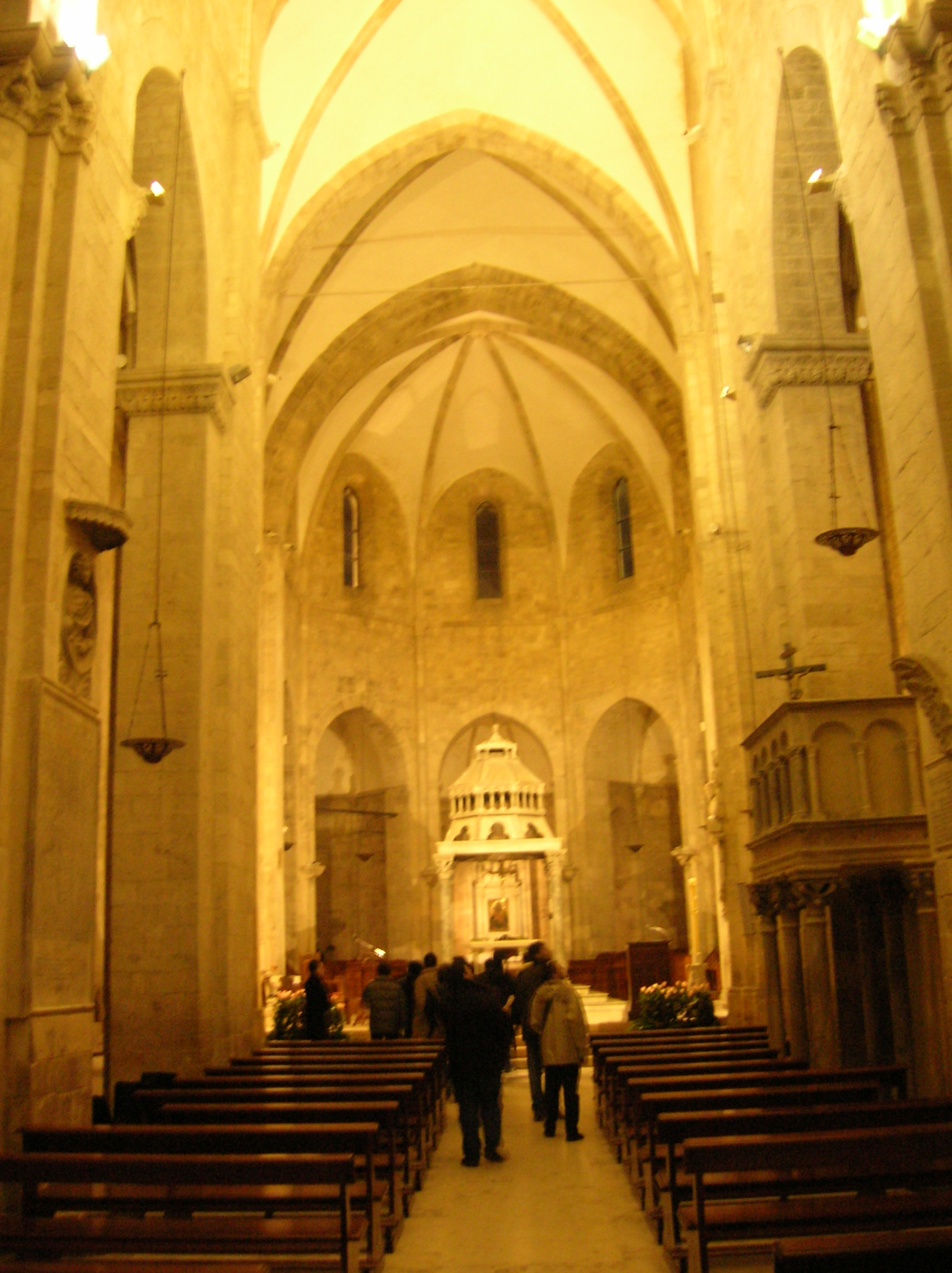 Navatacentrale cattedrale barletta puglia